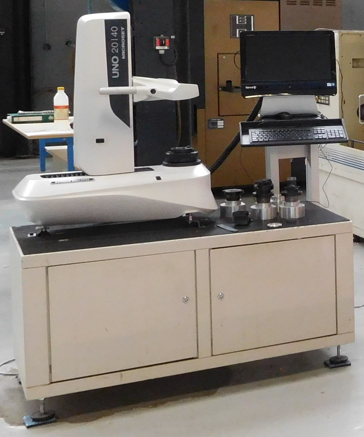 Lycée Albert-Claveille : banc de préréglage d'outils (tool presetting) DMG Mori Microset Uno 20140 d'un atelier de mécanique. Périgueux (Dordogne, France).